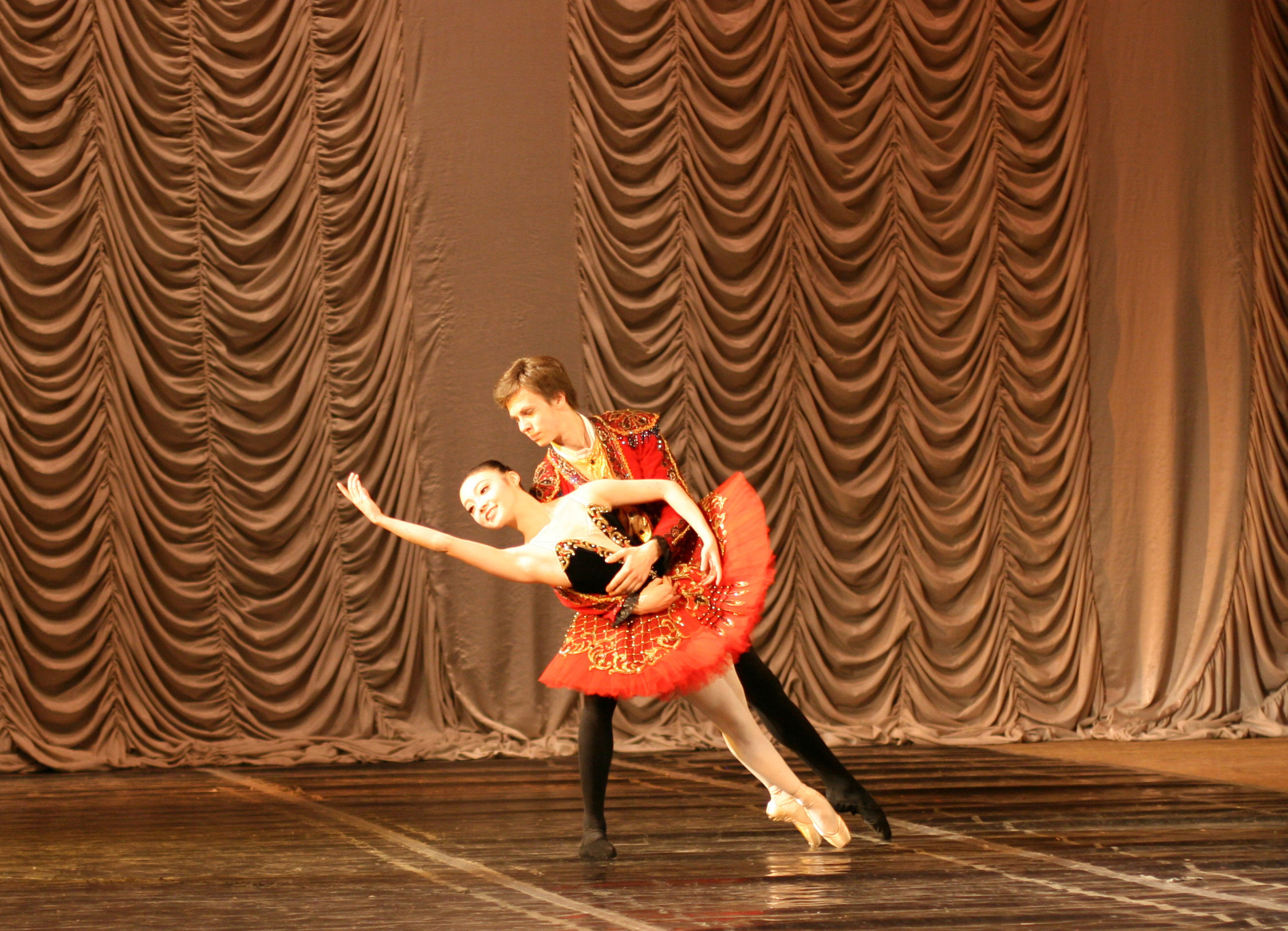 Культурный Центр Кияночка